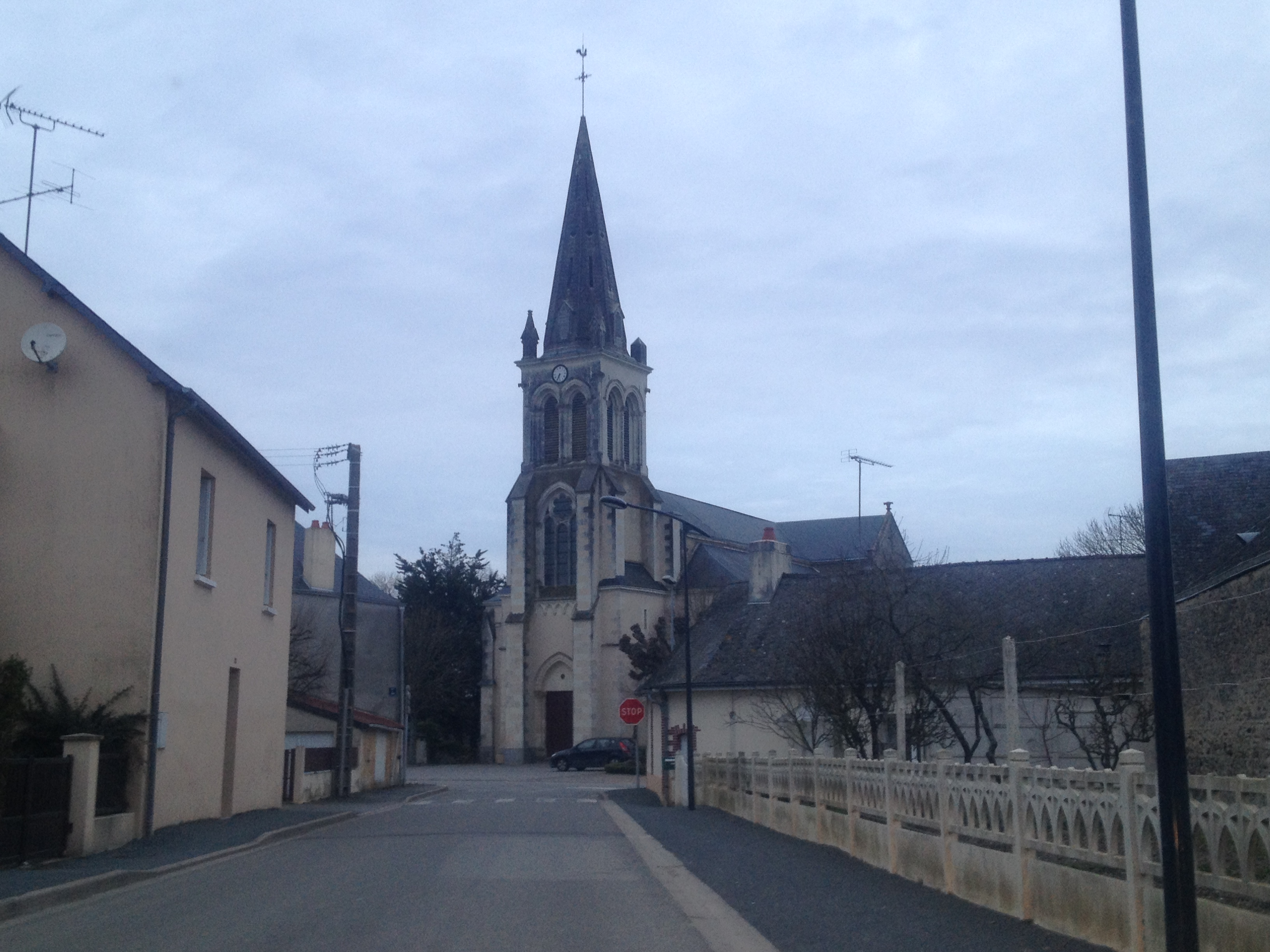 Mayenne, France